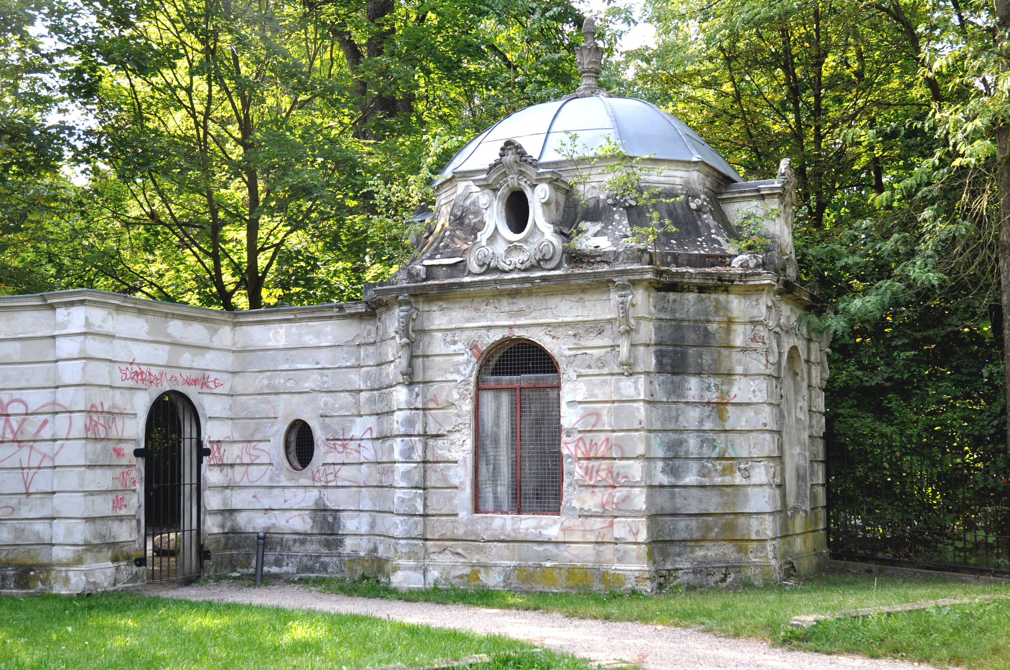 Klein Glienicke Jagdschloss, Kurfürstentor-Pavillon